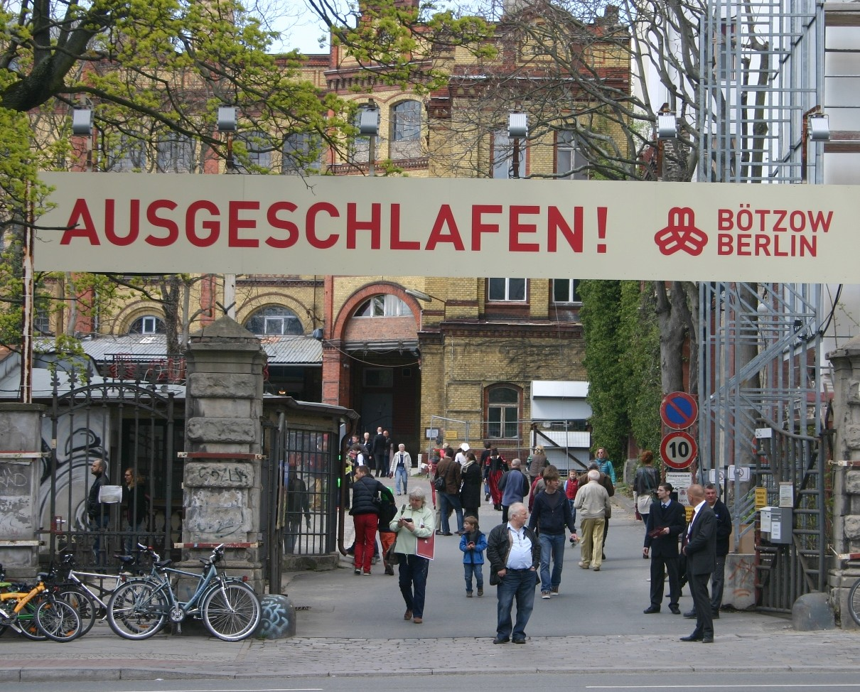 Der Unternehmer Hans Georg Näder hat das Gelände der Bötzow-Brauerei Ende 2010 gekauft und will es bis 2020 zu einem Gewerbe- Wohn- und Einkaufsstandort entwickeln. Verheißungsvoll kündet seit 2011 ein Plakat über dem alten Eingang "Ausgeschlafen!". Beim Frühling auf Bötzow kamen viele Besucher zum Tag der offenen Tür.